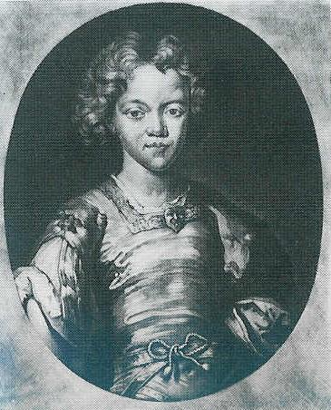 August III